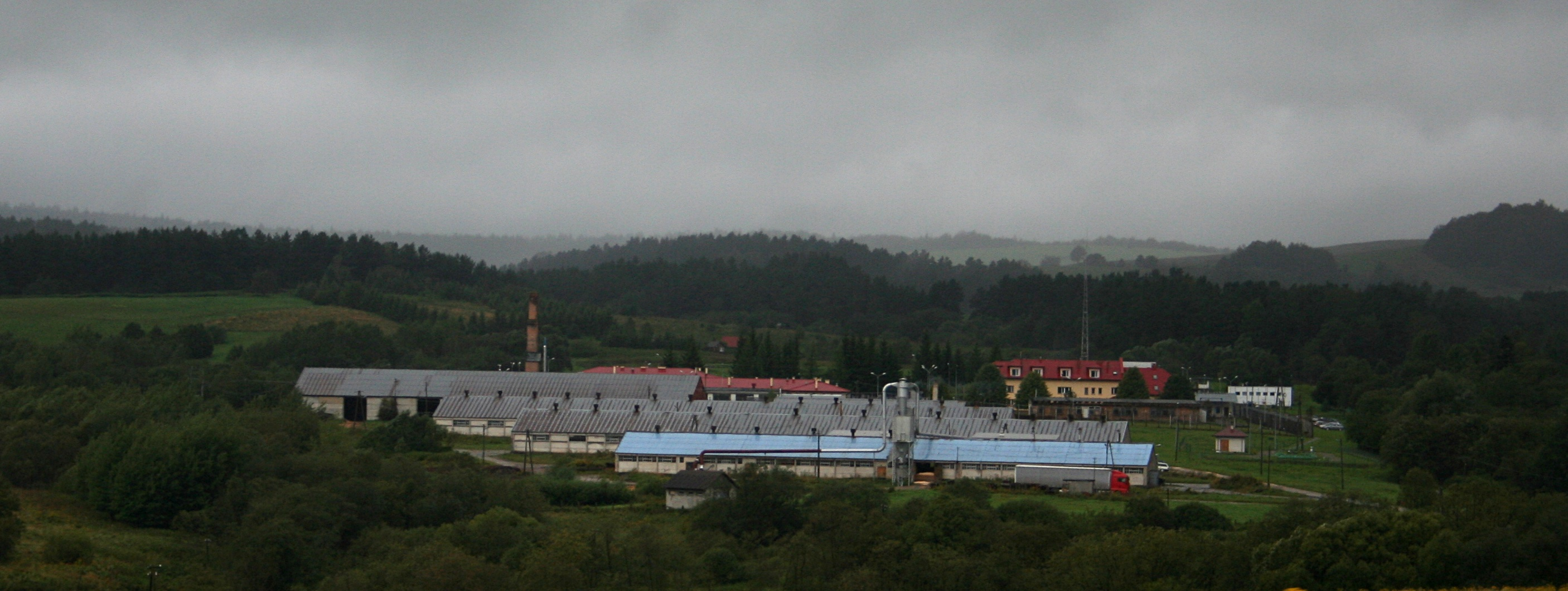 NIezidentyfikowane zakłady przy drodze DW 897 między Nowym Łupkowem a Wolą Michowską, woj. podkarpackie